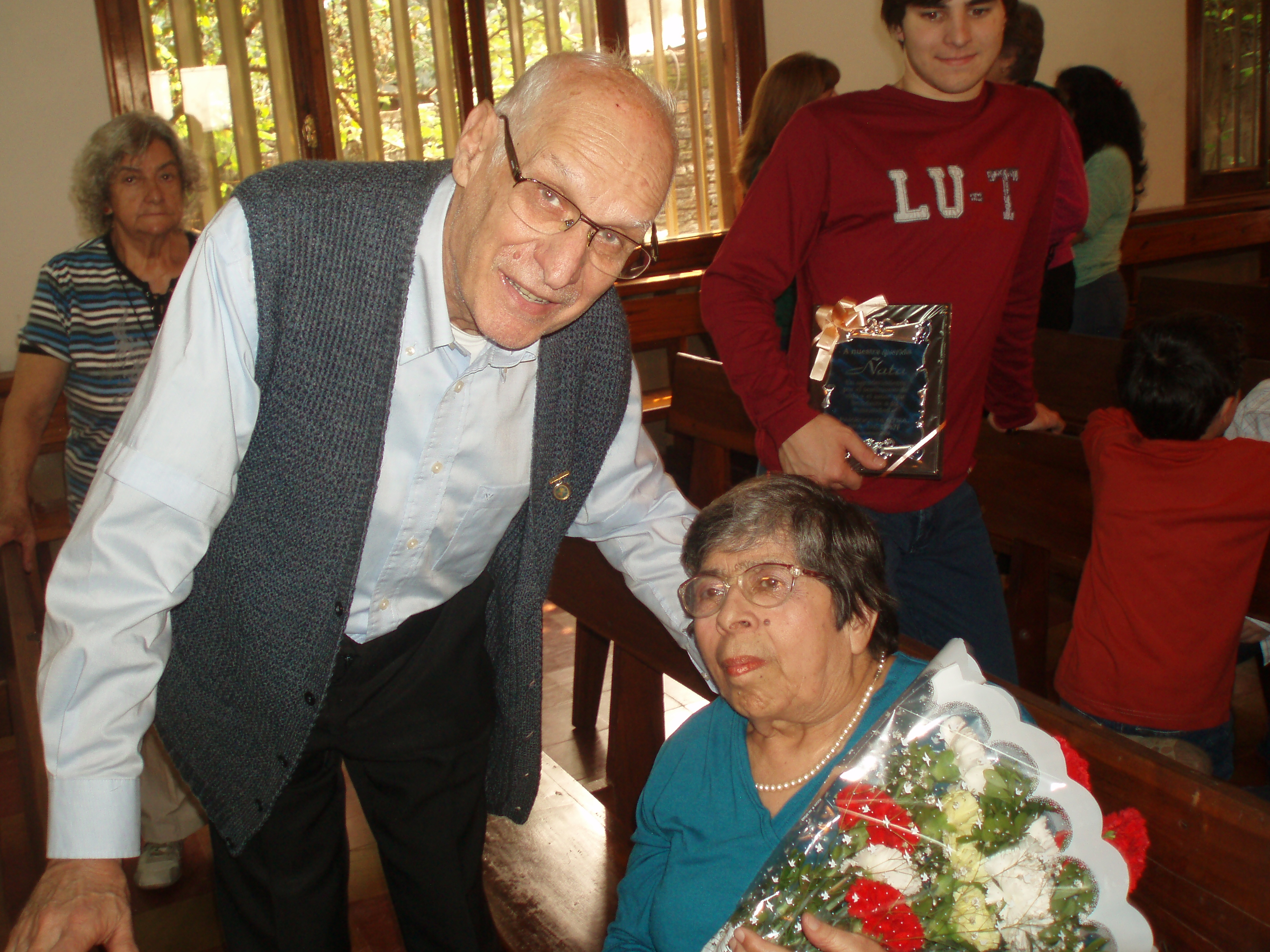 Joaquín Piña, Monseñor Emérito de la Diócesis de Puerto Iguazú al finalizar una Misa en el mes de Septiembre de 2010. Homenaje a una de las fieles colaboradoras de la Parroquia Itatí, la Señora "Ñata" por su testimonio de vida y amor brindado a la comunidad. Foto del periodista Horacio Cambeiro.